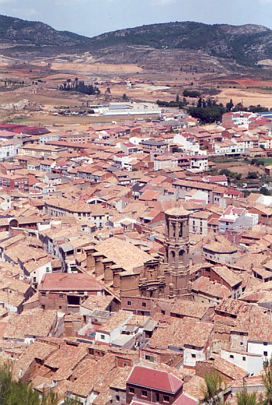 Andorra (Teruel) - Centro histórico